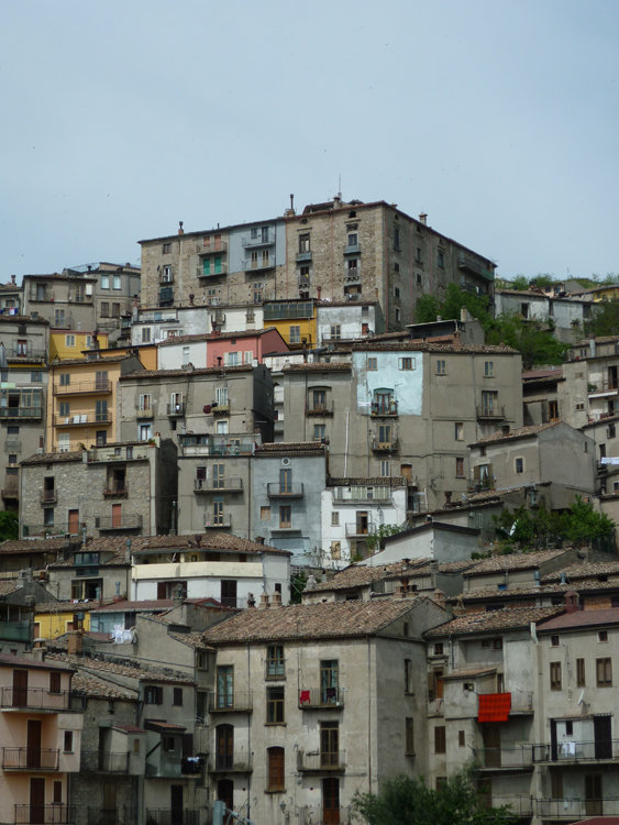 San Giovanni inFiore -Palazzo Barberio Toscano e il quartiere "Filippa"